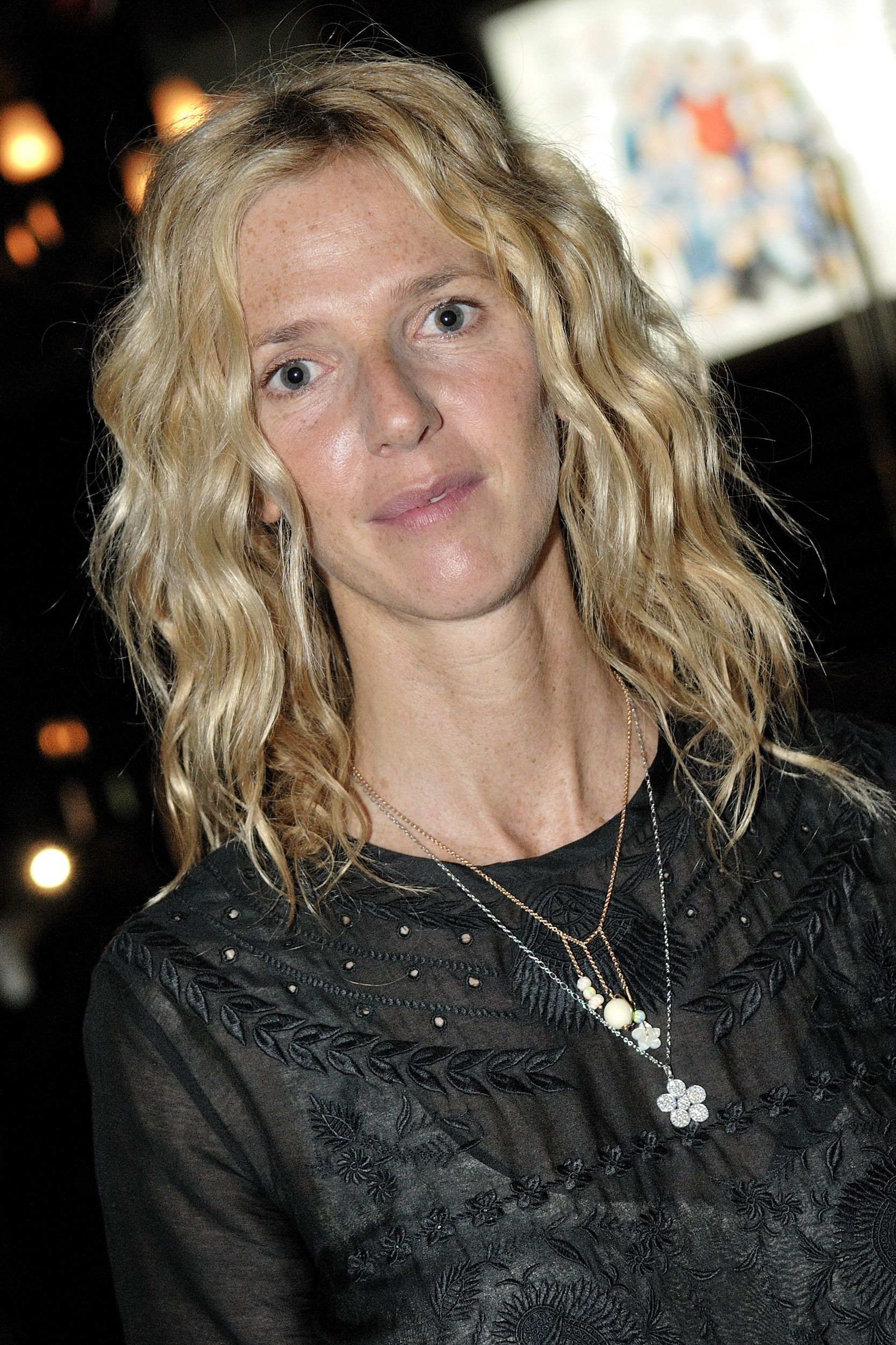 Avant-première du film Le petit Nicolas au Grand Rex, à Paris, le 20 Septembre 2009, en présence de toute l'équipe de film. Ici Sandrine Kiberlain.